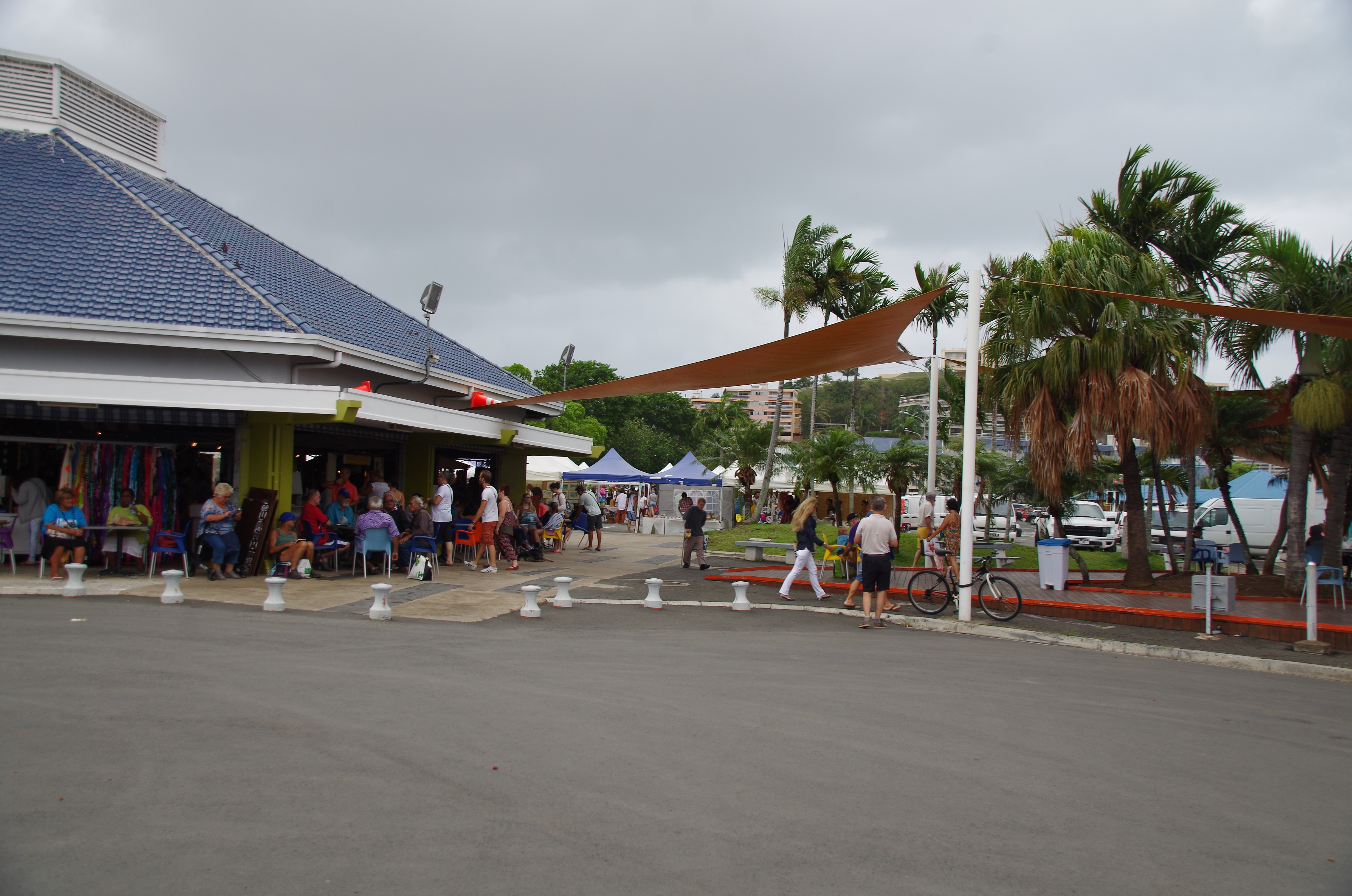 Markt Nouméa